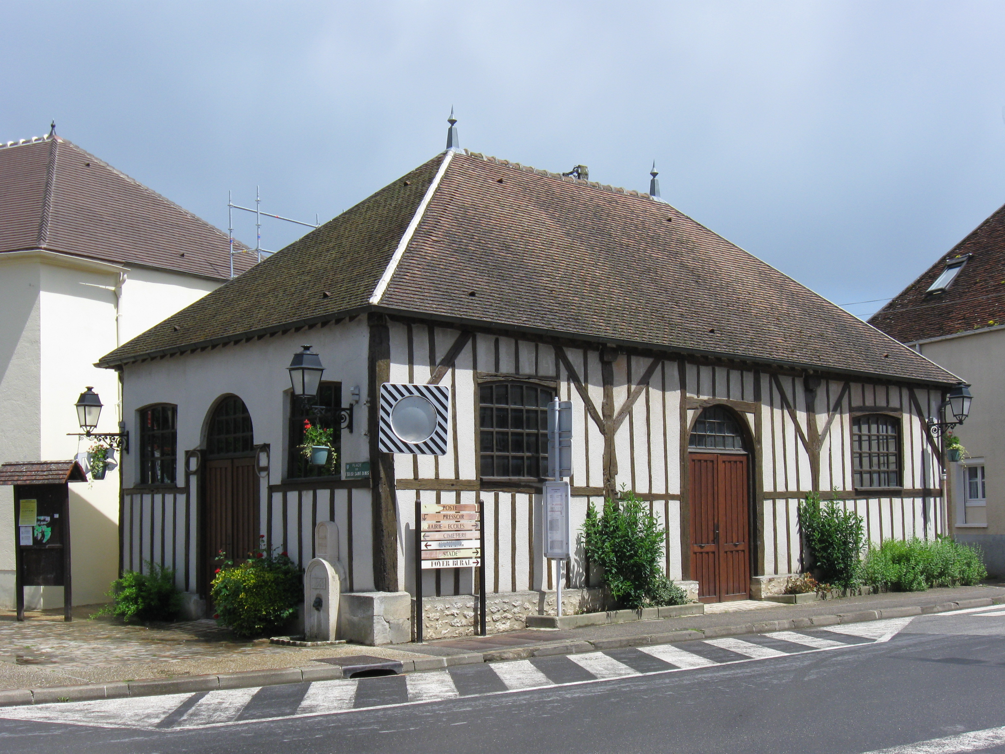 Ancienne halle de Beton-Bazoches. (Seine-et-Marne, région Île-de-France).